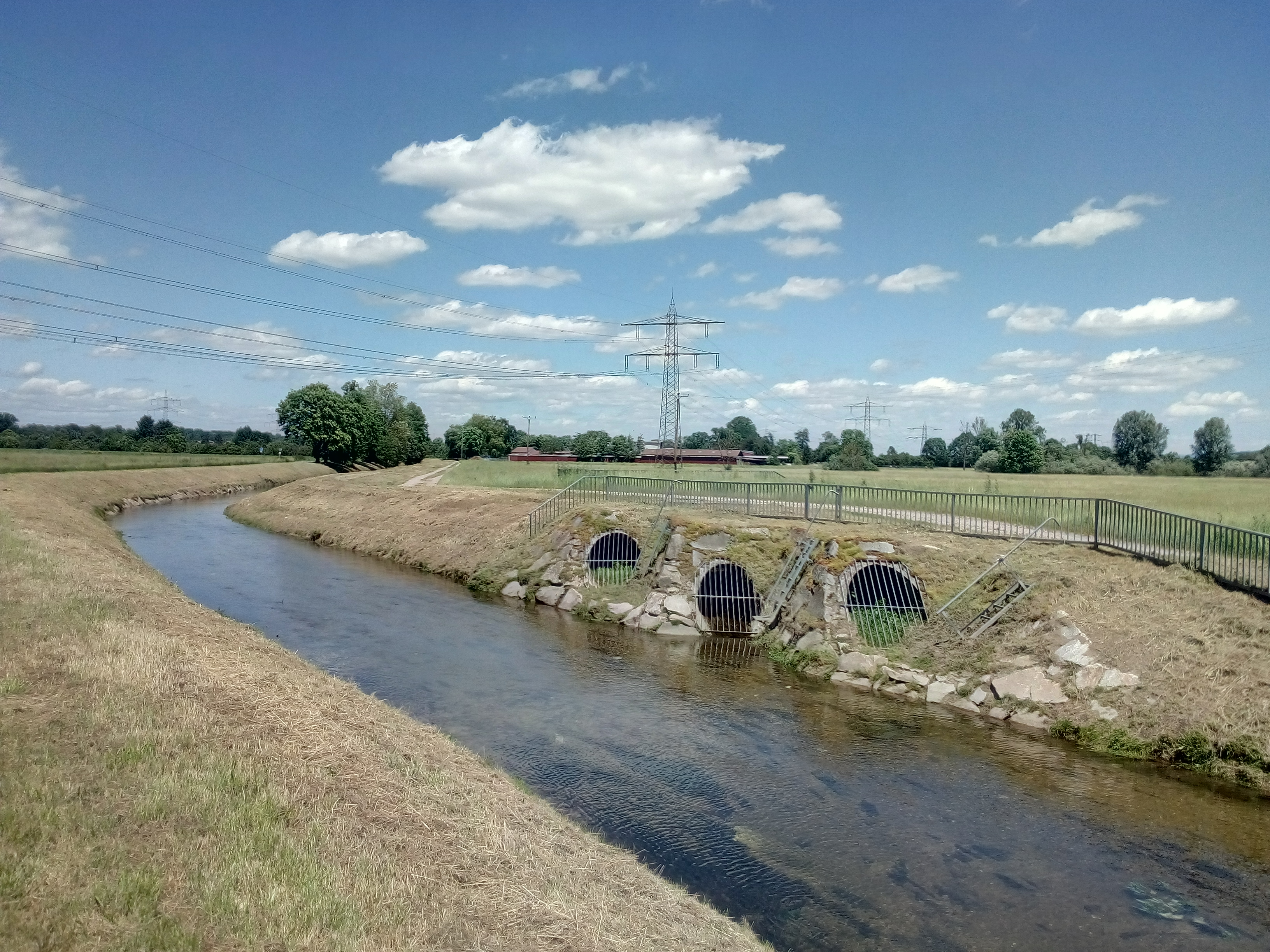 Abzweig HW-Entlastungskanal Sandbach vom Sandbach südlich von Halberstung